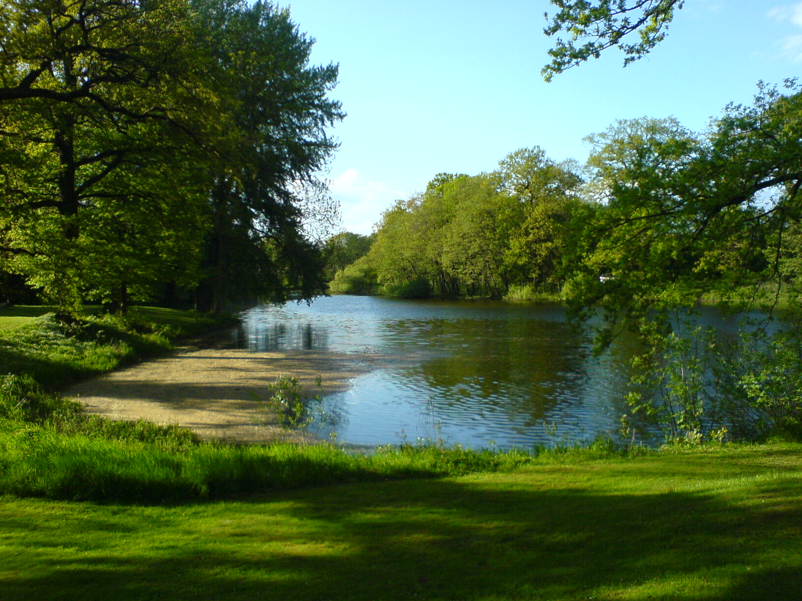 Jersbek Graben